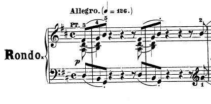 Compassos iniciais do quarto movimento da Sonata para piano n.º 7, Op. 10 nº 3 de Ludwig van Beethoven